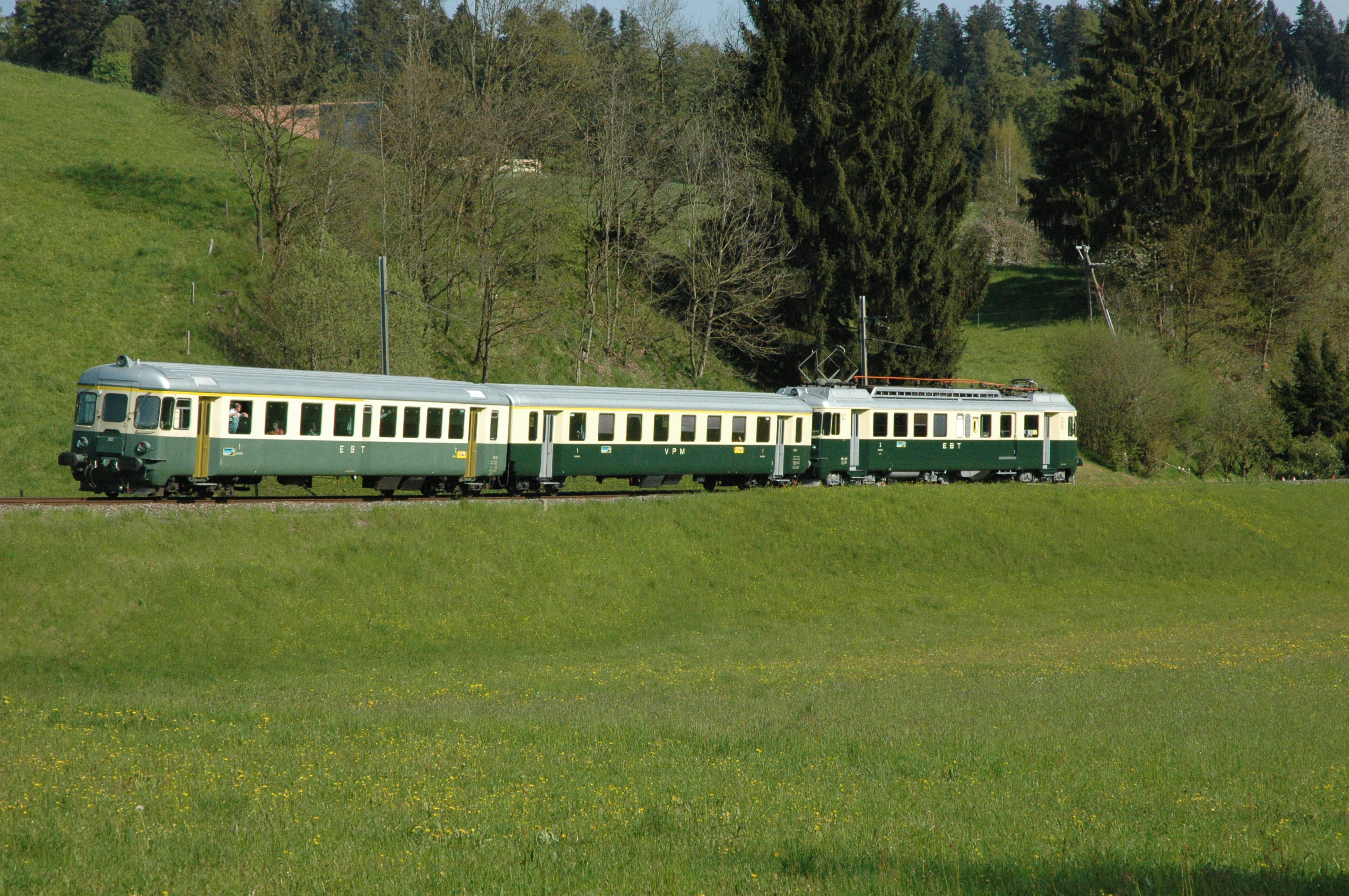 Pendelzug des Vereins Pendelzug-Mirage (VPM) mit Triebwagen BDe 4/4 II oberhalb Gammenthal auf der Strecke der Emmentalbahn GmbH. Trieb- und Seuerwagen gehörten ursprünglich der Südostbahn, der Zwischenwagen der SBB.